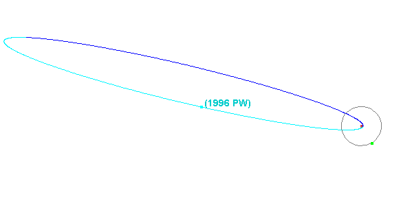 Bahnvergleich 1996 PW-Neptun